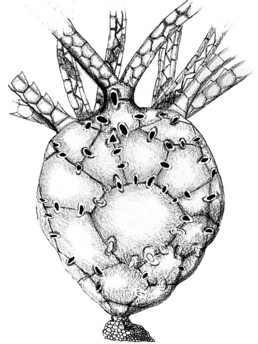 Reconstruction of eocrinoidean blastozoan Gogia parsleyi Zamora sp. nov. (by Santiago Alberto, after a sketch by SZ), based on the holotype MPZ2004/162a. The holdfast, not preserved in the holotype, is reconstructed based on paratypes MPZ2004/161 and MPZ2004/215.